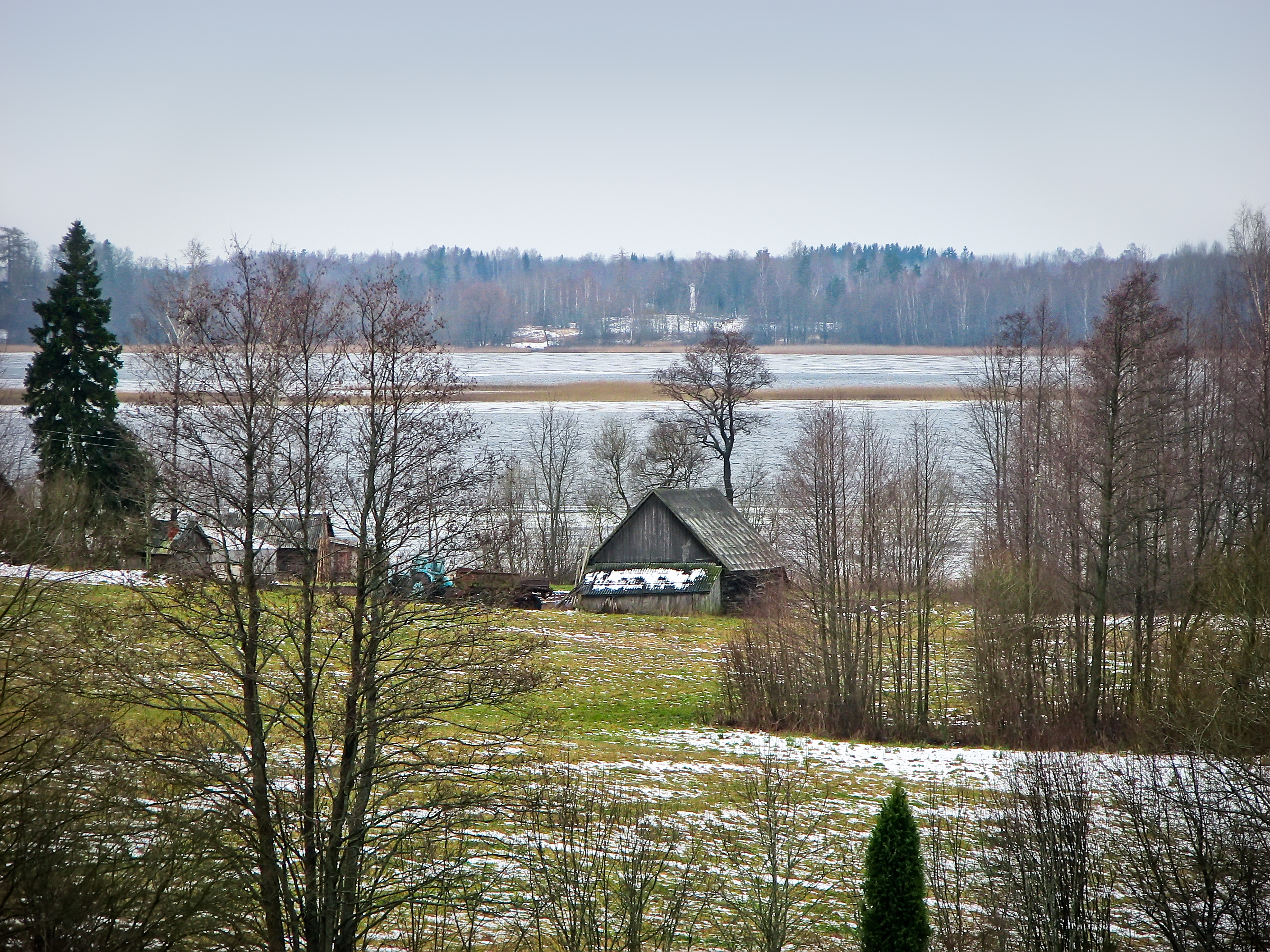 Kastuļina parish, Latvia